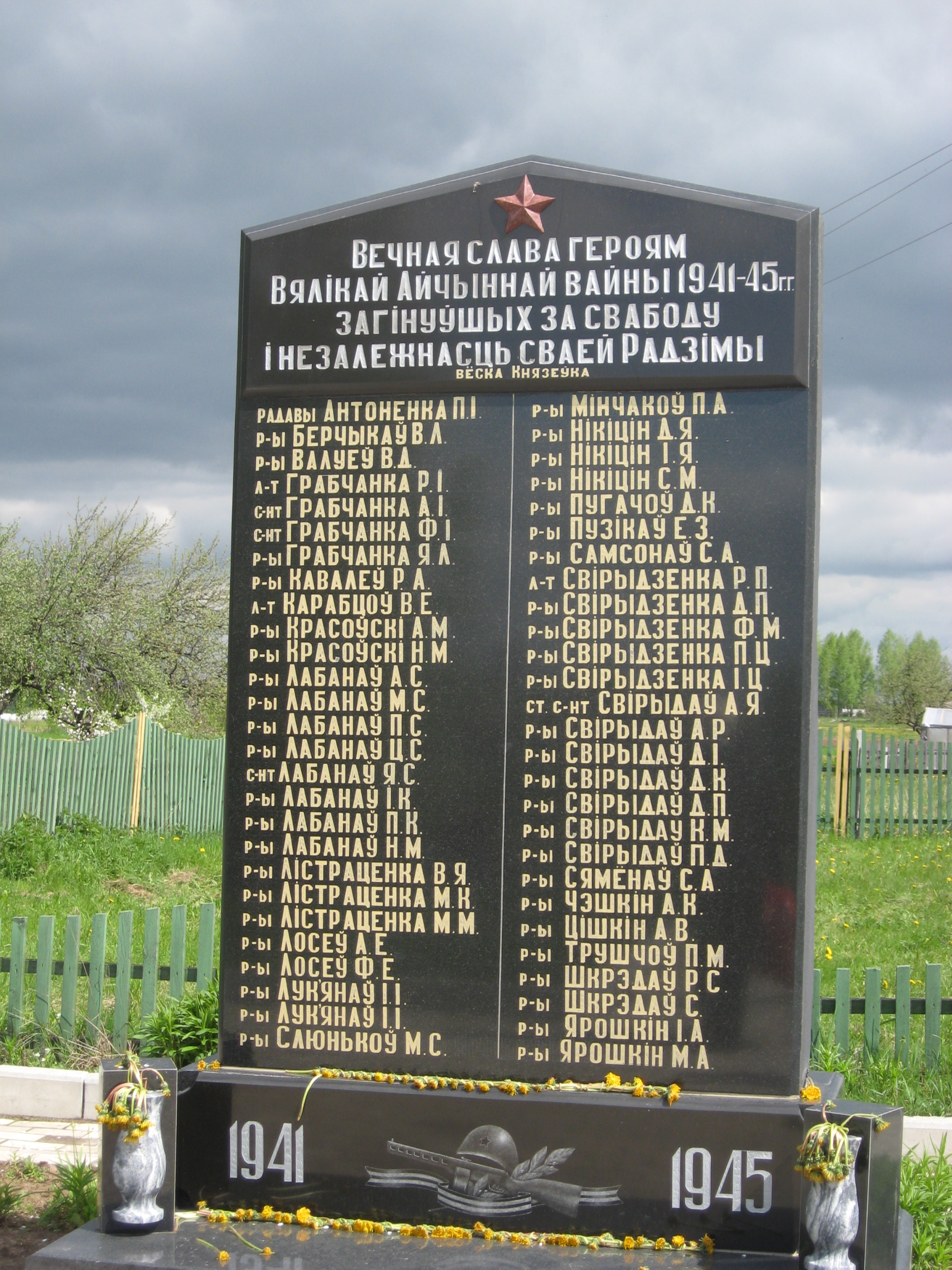 Мемориальная плита, ушедших на ВОВ